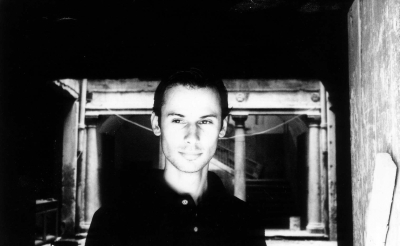 DJ Robert Meyer, schwarz/weiss